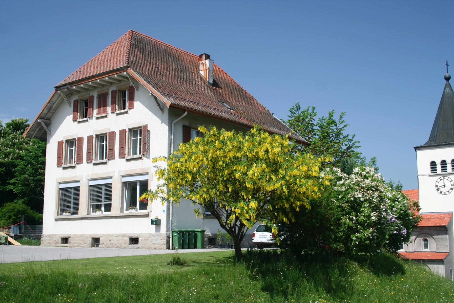 Ecole de Sommentier